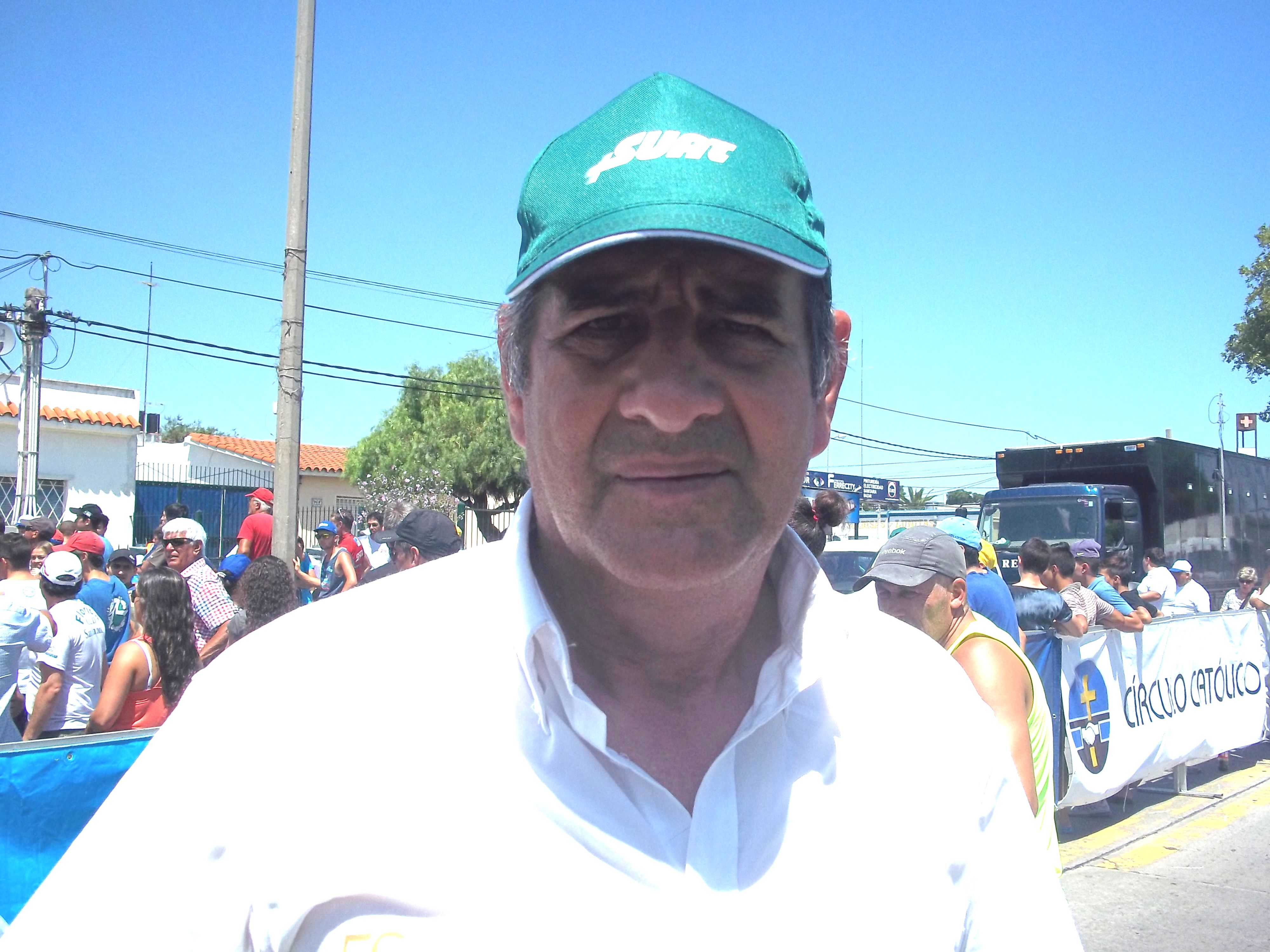 Federico Moreira. Ex ciclista y presidente de la Federación Uruguaya de Ciclismo